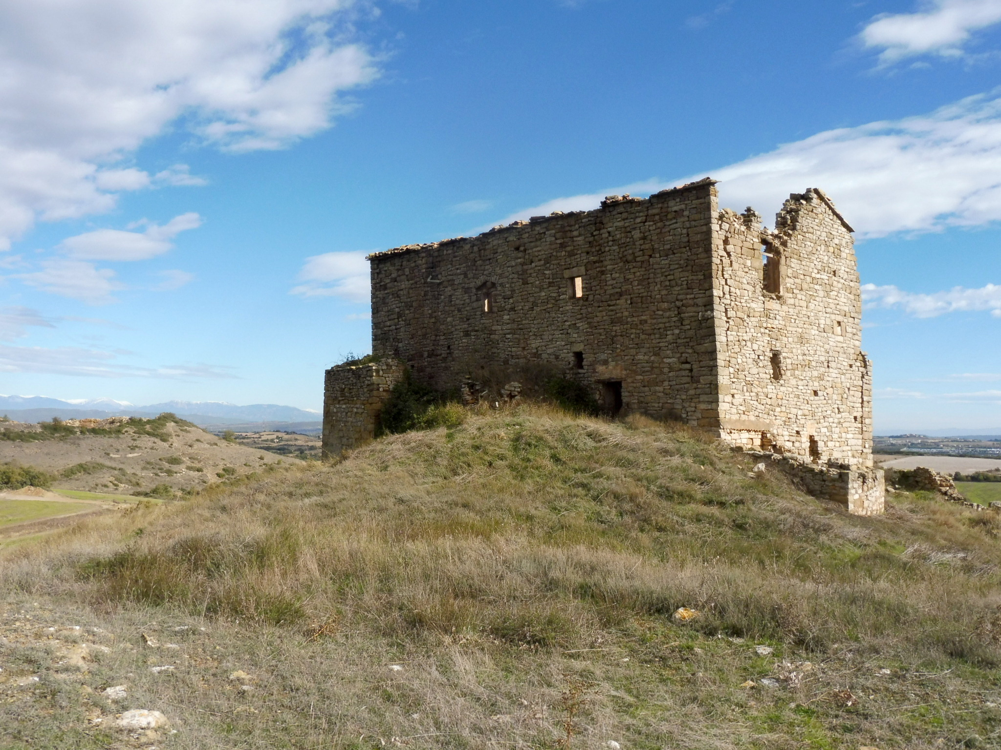 Ferrera (Calaf): façana de ponent i sud